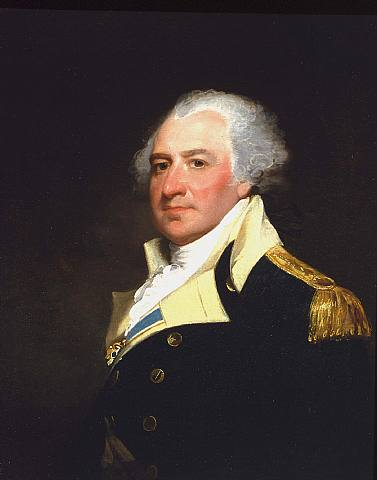 Thomas Mifflin